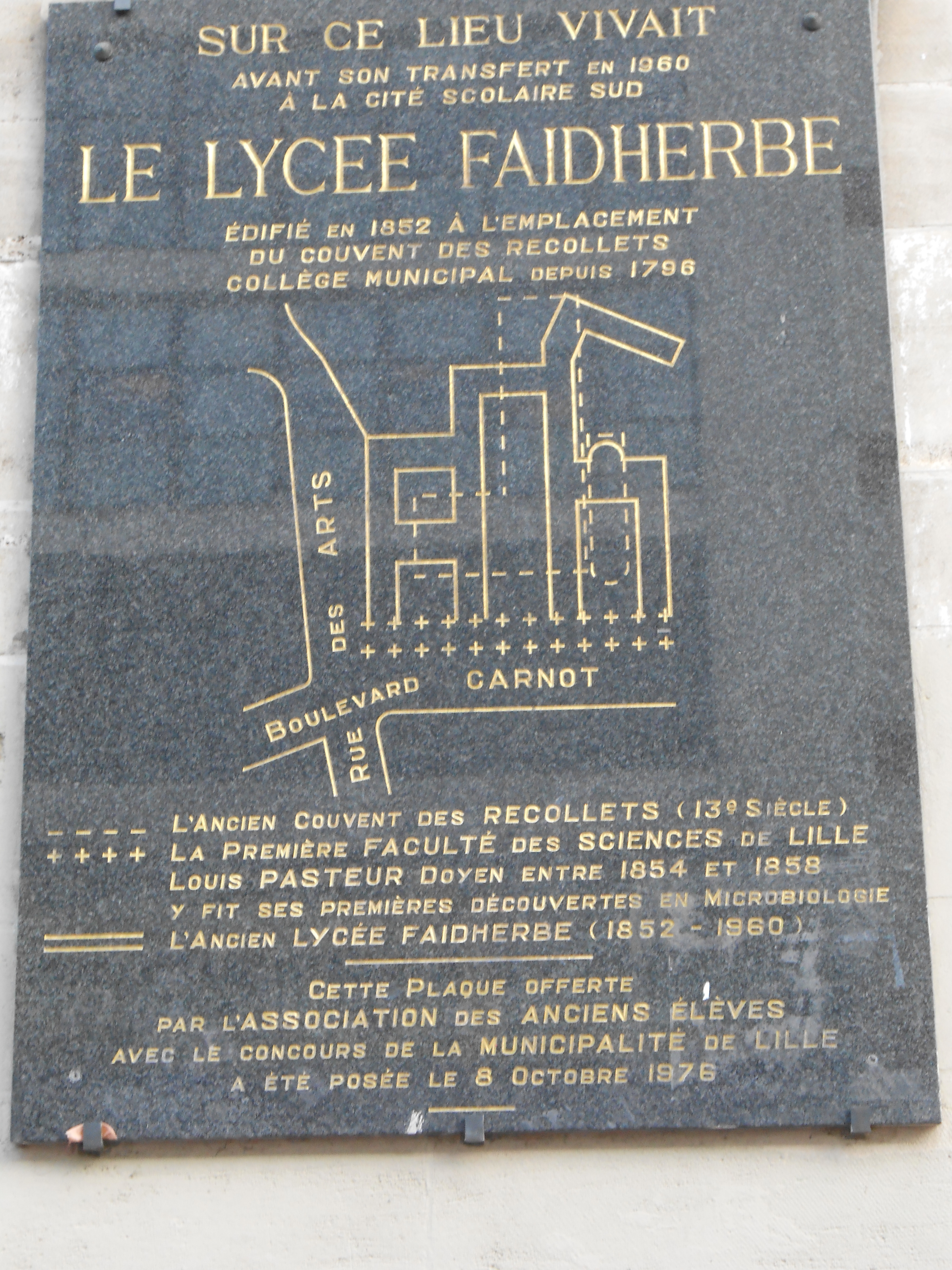 Lille (France - dép. du Nord — Plaque placée sur un mur à proximité du 45 boulevard Carnot, sur lequel figure un plan des anciens bâtiments du lycée Faidherbe, situé à l'angle de la rue des Arts et du Bd Carnot. Historique du lieu : Couvent des Récollets ; École centrale, écoles académiques de Lille, chaires municipales et collège de Lille ; Faculté des sciences de Lille, (premier doyen Louis Pasteur) ; Lycée de Lille ; Lycée Faidherbe